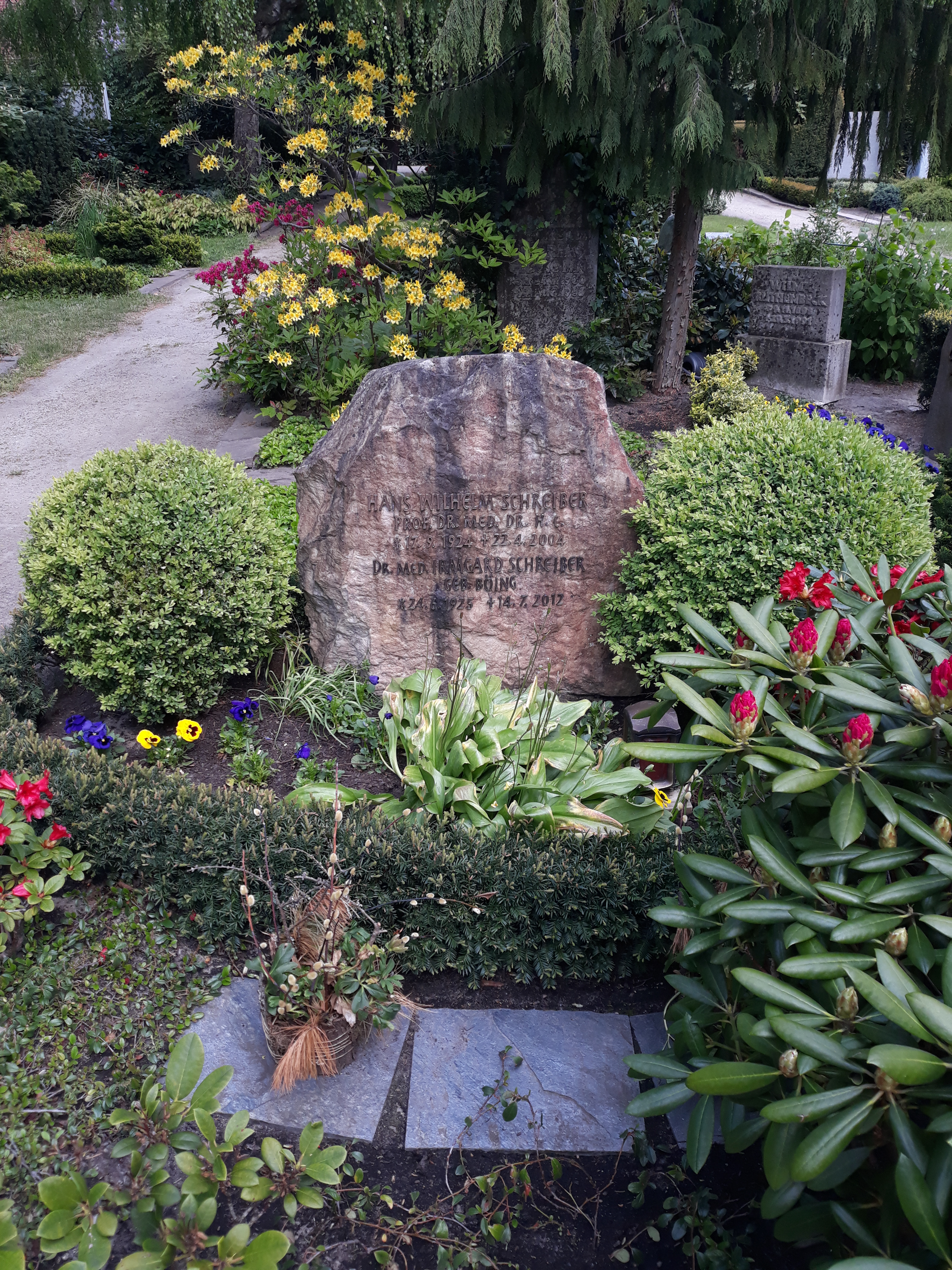 Das Grab des deutschen Chirurgen Hans-Wilhelm Schreiber und seiner Ehefrau Irmgard geborene Böing auf dem Alten Friedhof Niendorf in Hamburg.